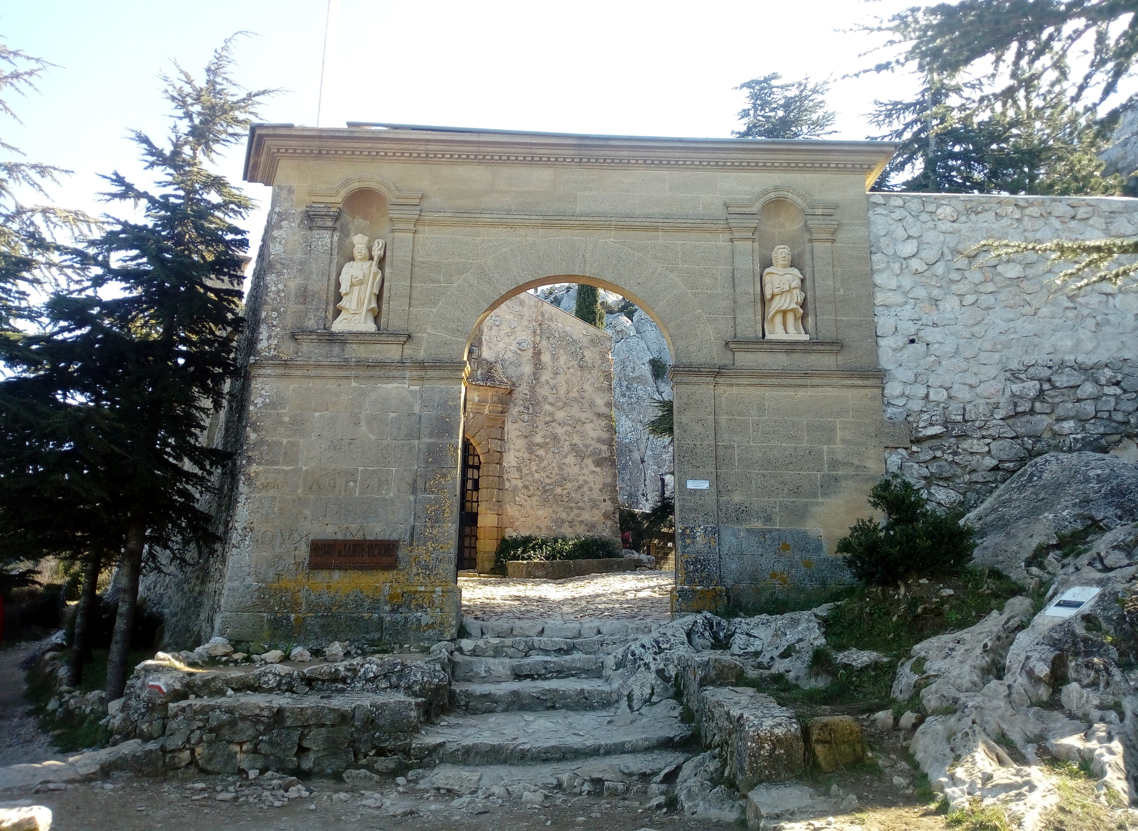 Prieuré de Sainte-Victoire en 2020.